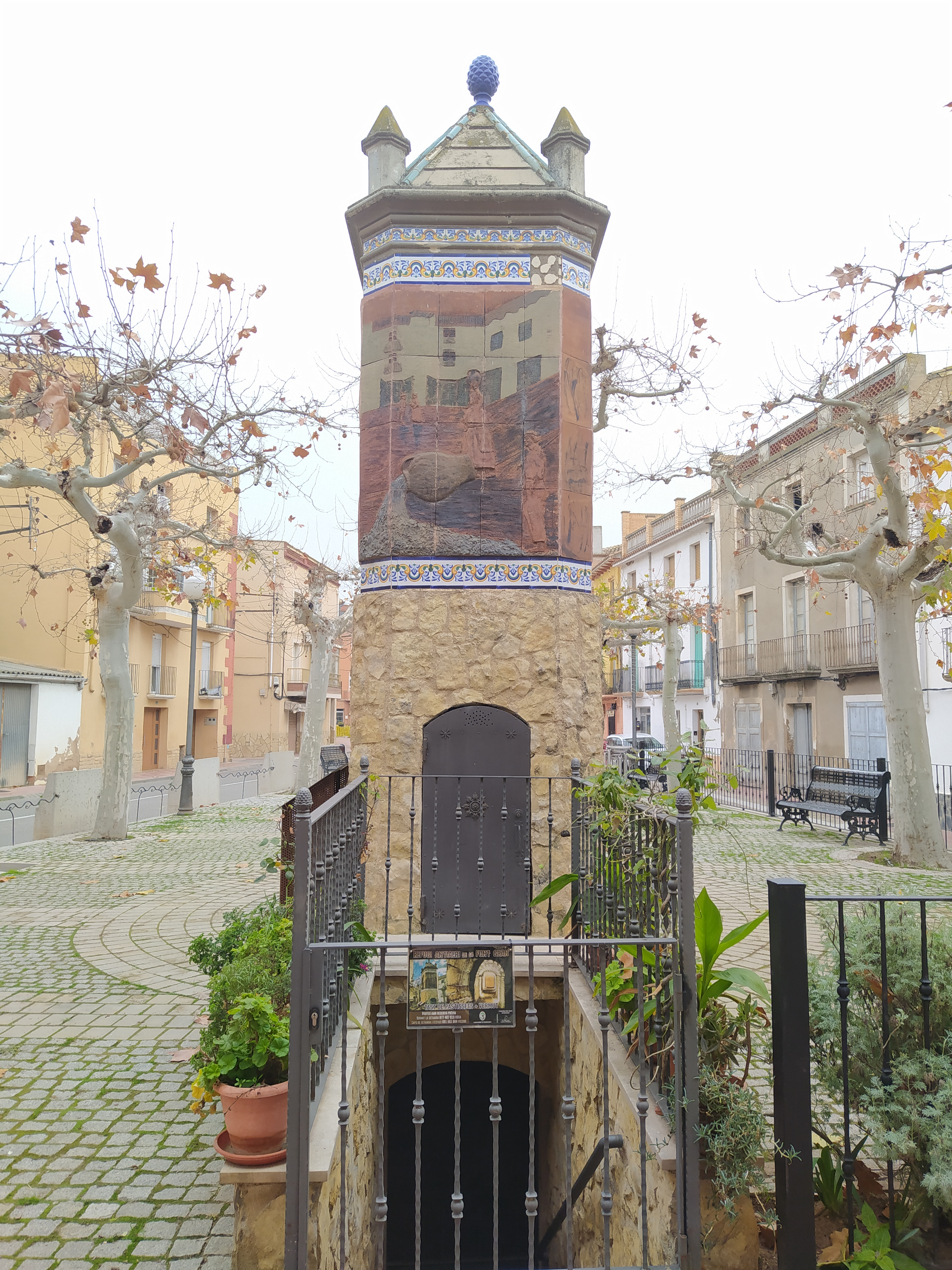 Font Gran (Benissanet): cara oest i entrada al refugi antiaeri